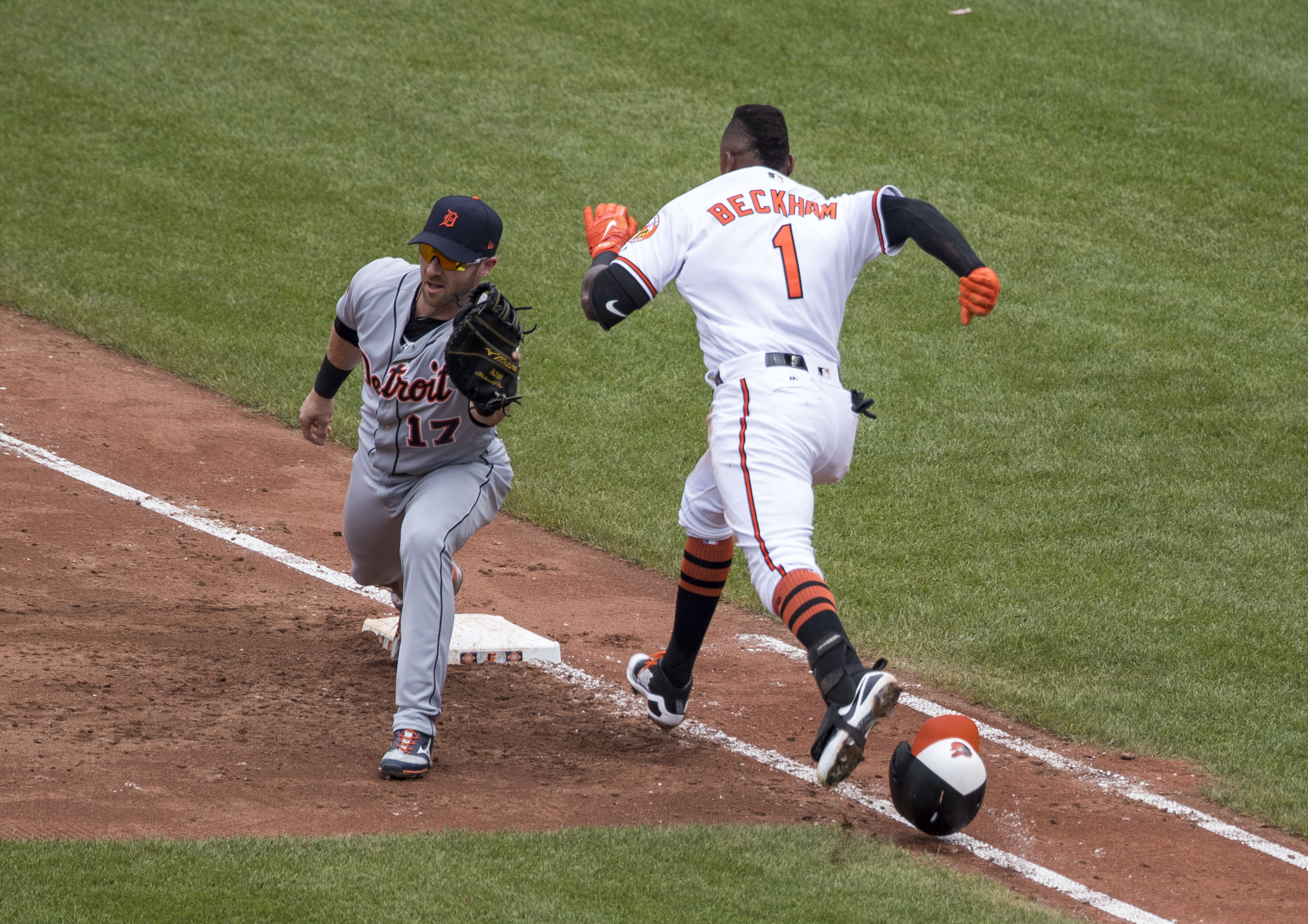 Tigers at Orioles 8/6/17